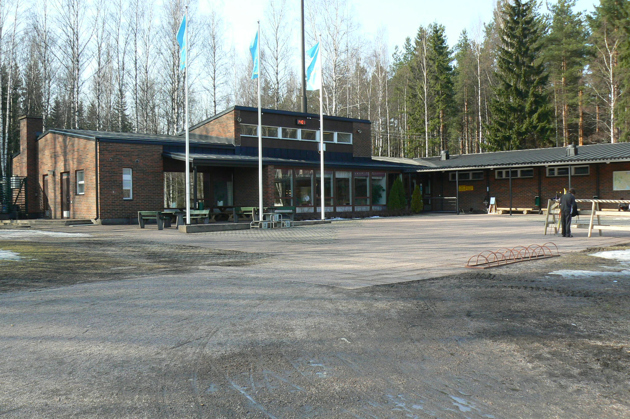 Paloheinän ulkoilukeskus